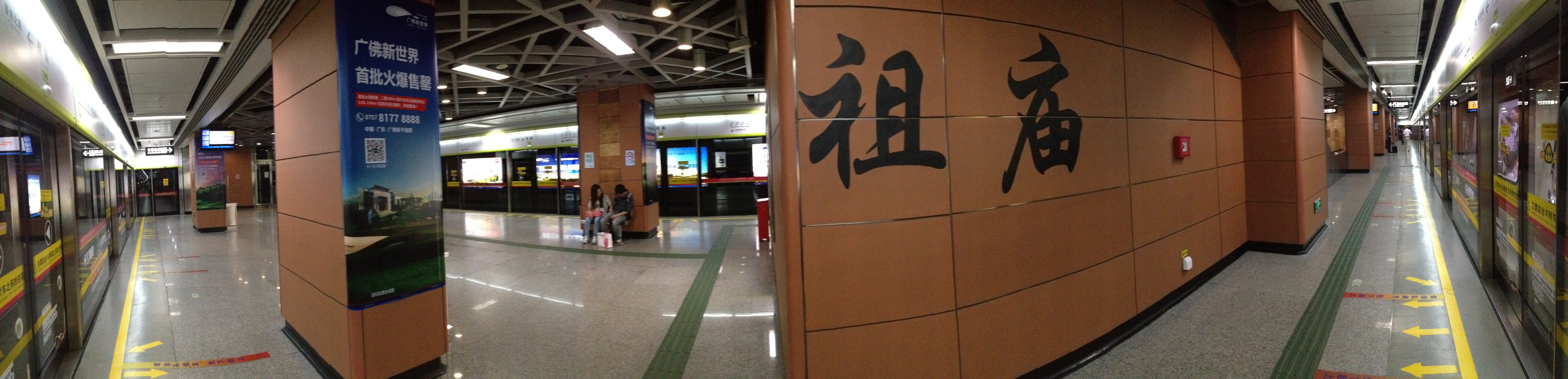 广佛地铁祖庙站月台全景图